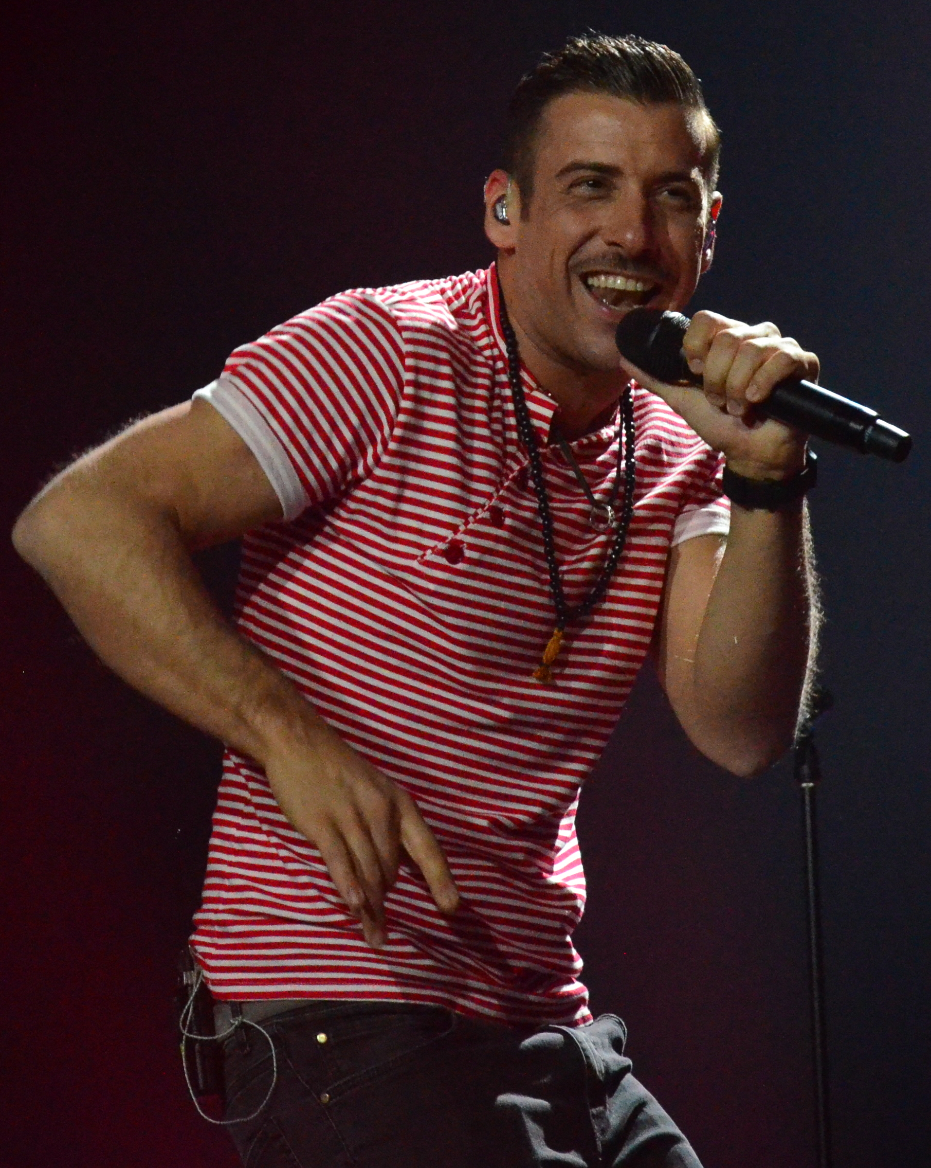 12 травня. Генеральна репетиція фіналу Євробачення 2017. Francesco Gabbani (Italy).